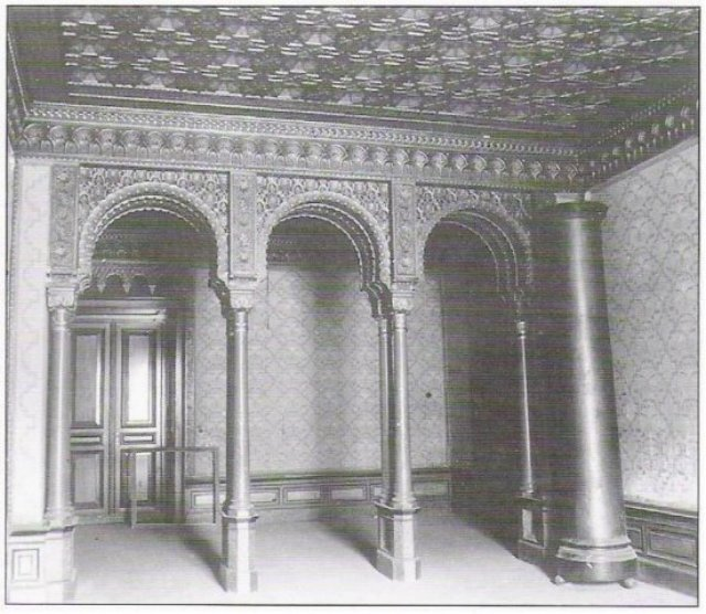 Sala Mauretańska z 1965 roku. Pałac w Krowiarkach.